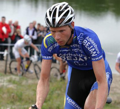 deze foto is genomen door Bert Geerts en is vrij te gebruiken